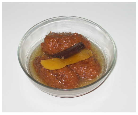 Las pelotas de cocido en dulce (denominado también pelotas o pelotillas) es un postre típico de varios pueblos de la serranía baja conquense